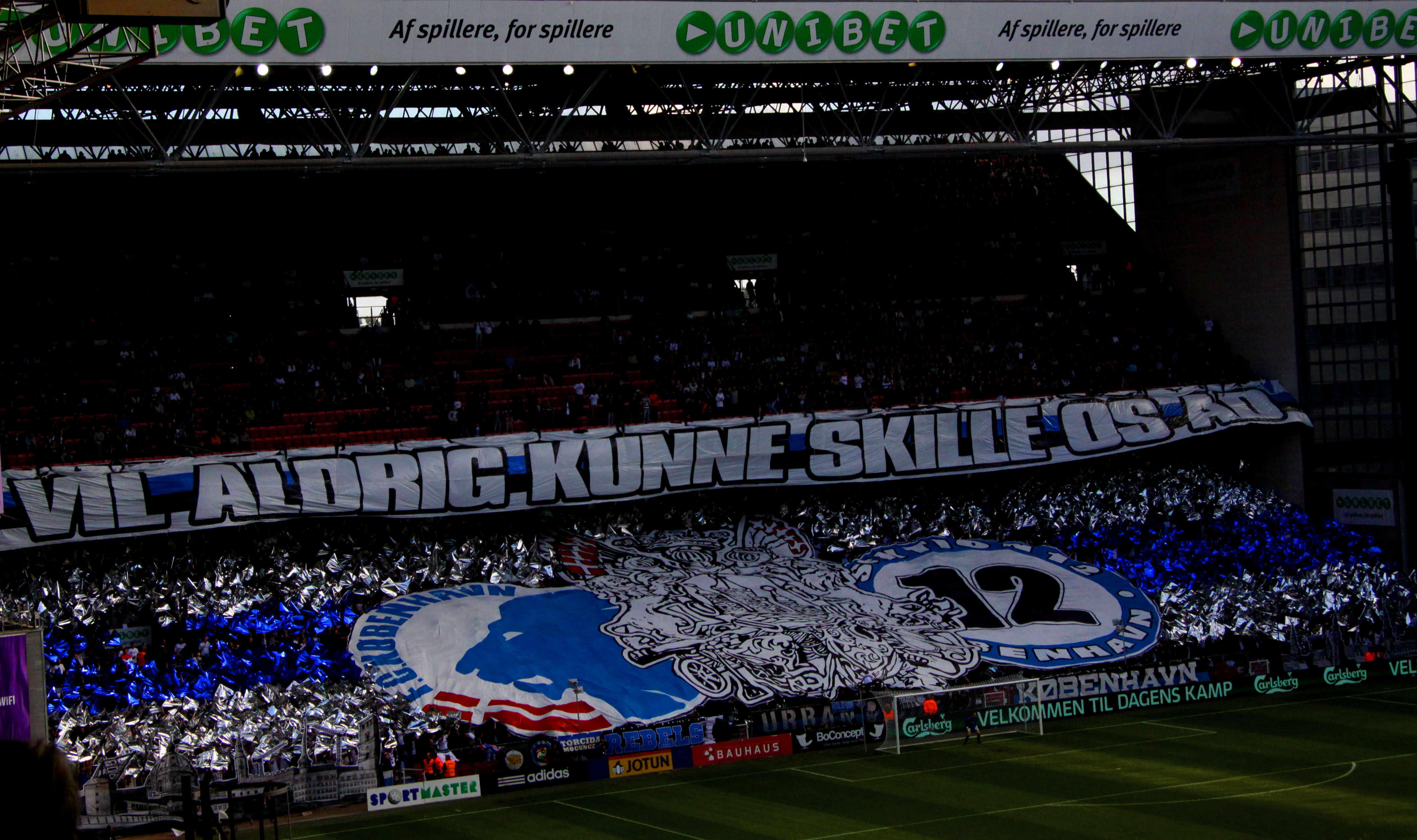 København / Copenhagen. FCK - Brøndby i Parken.